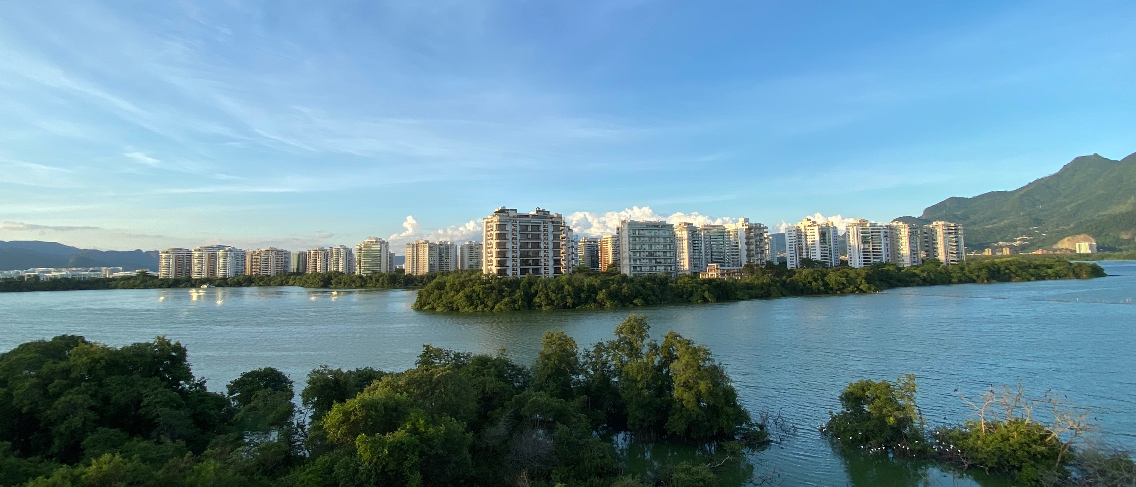 Vista do condomínio Península, do VillageMall.